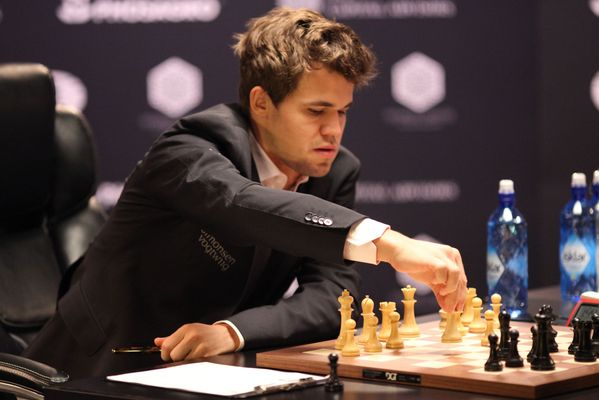 Карлсен - Карякин, 12 партия